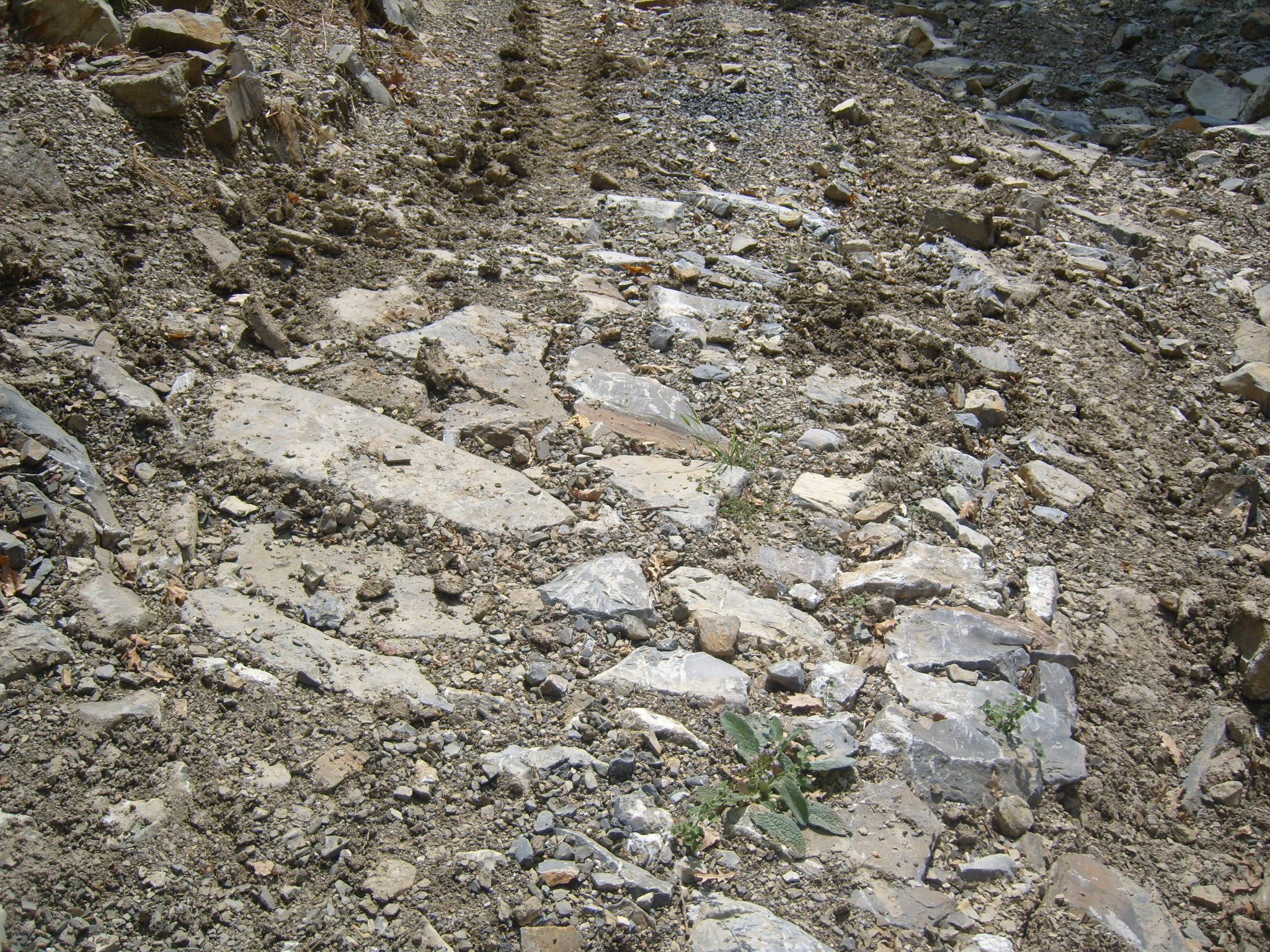 Tracciato di "Via degli Stranieri" - zona archeologica di Monte Pruno - Roscigno (Salerno) - Italia